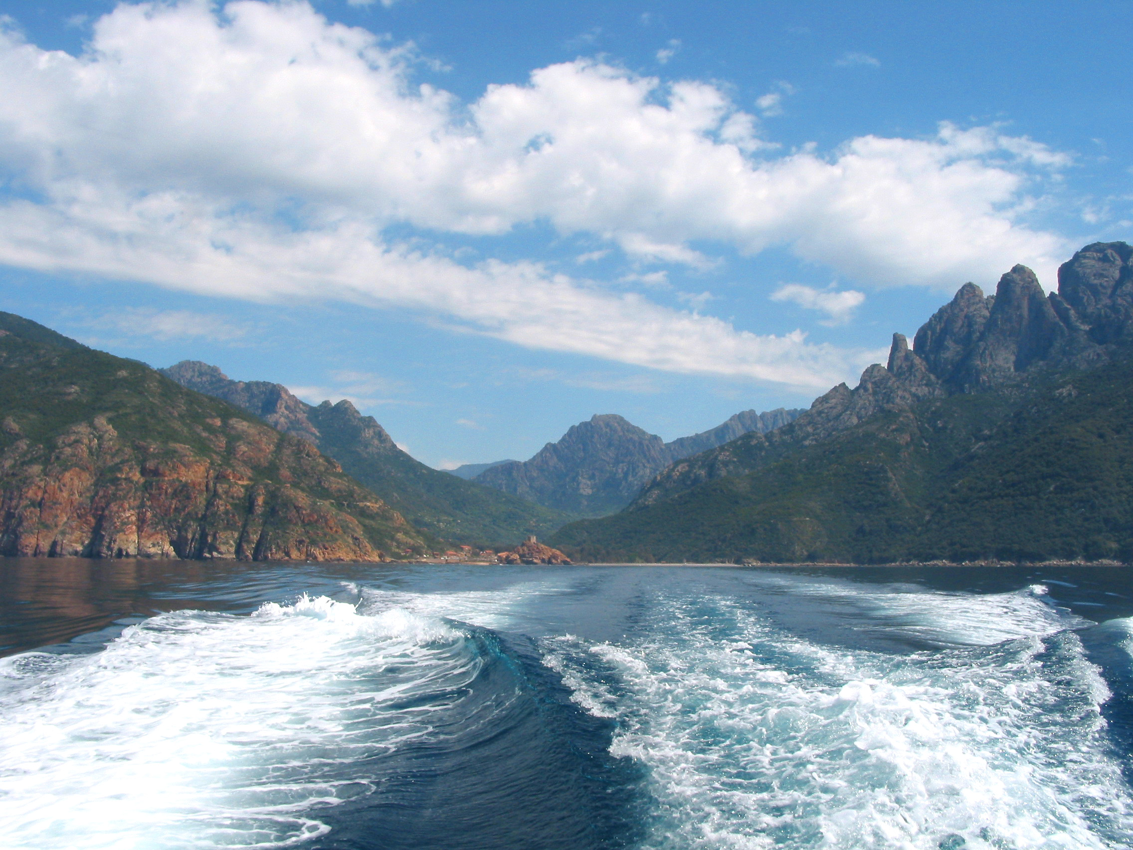 Ota France, le Golfe de Porto (Corse-du-Sud) et le Capo d’Orto (montagnes à droite).